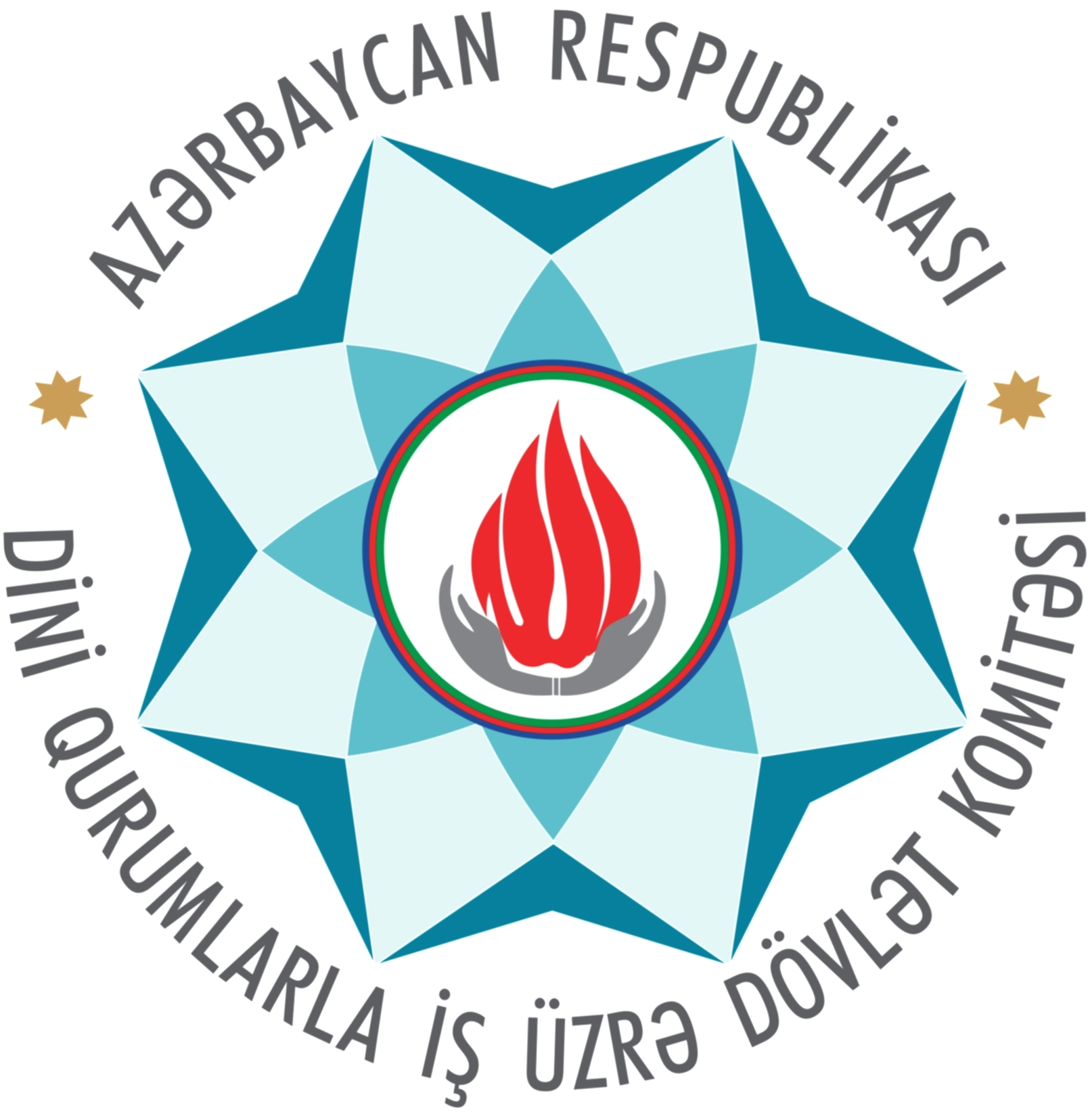 Azərbaycan Respublikası Dini Qurumlarla İş üzrə Dövlət Komitəsinin loqosu